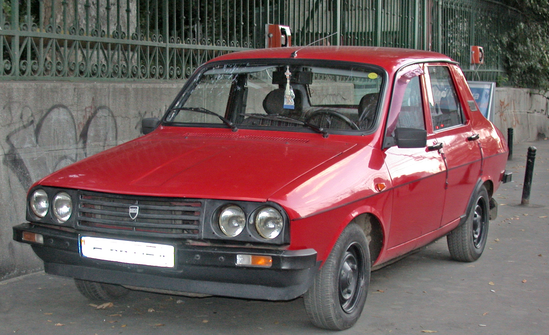 Automobile Dacia (a Bucarest)